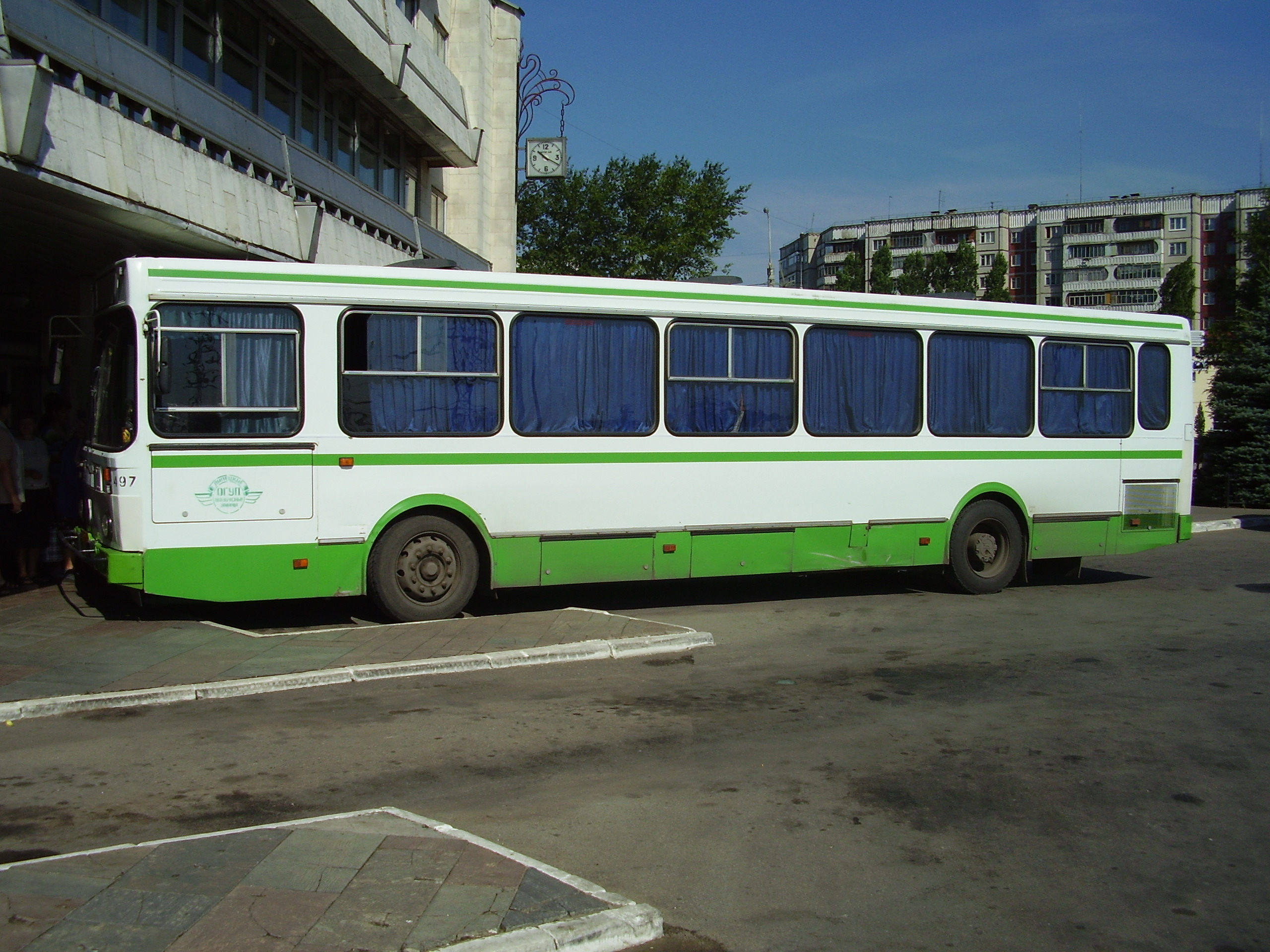 Пригородный ЛиАЗ-5256 в Липецке. - Bus LiAZ-5256, Lipetsk